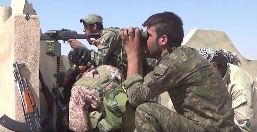 Combattants des Forces démocratiques syriennes à Raqqa, fin août 2017